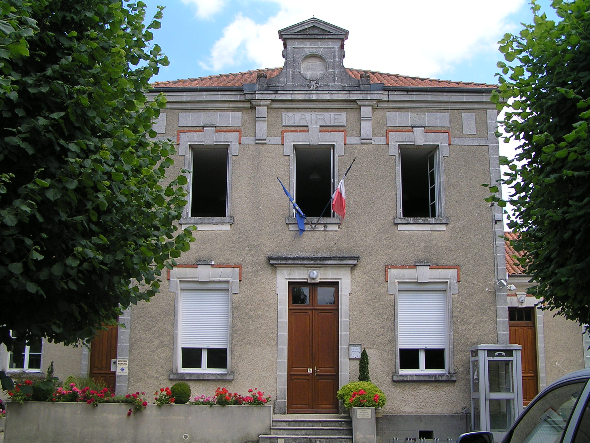 mairie de Sainte-Sévère